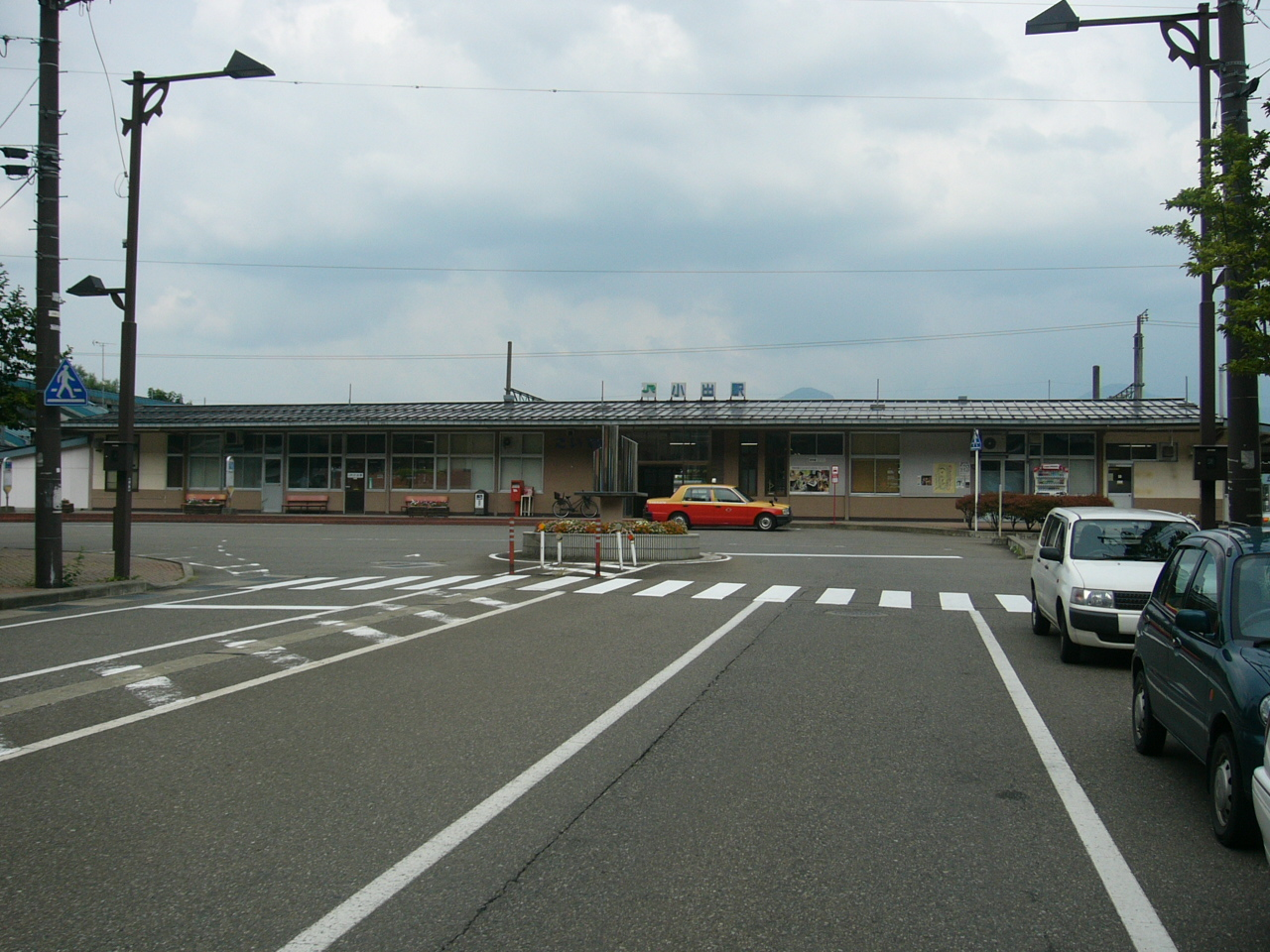 Koide Station